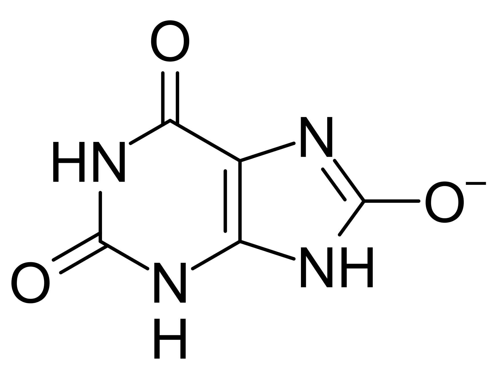 L'image représente l'ion ureate. Image créee par l'utilisateur Dwmyers (en:), 1er octobre 2002.